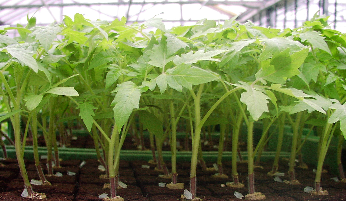 Tomatenjungpflanzem Kopf-Veredelungsstelle